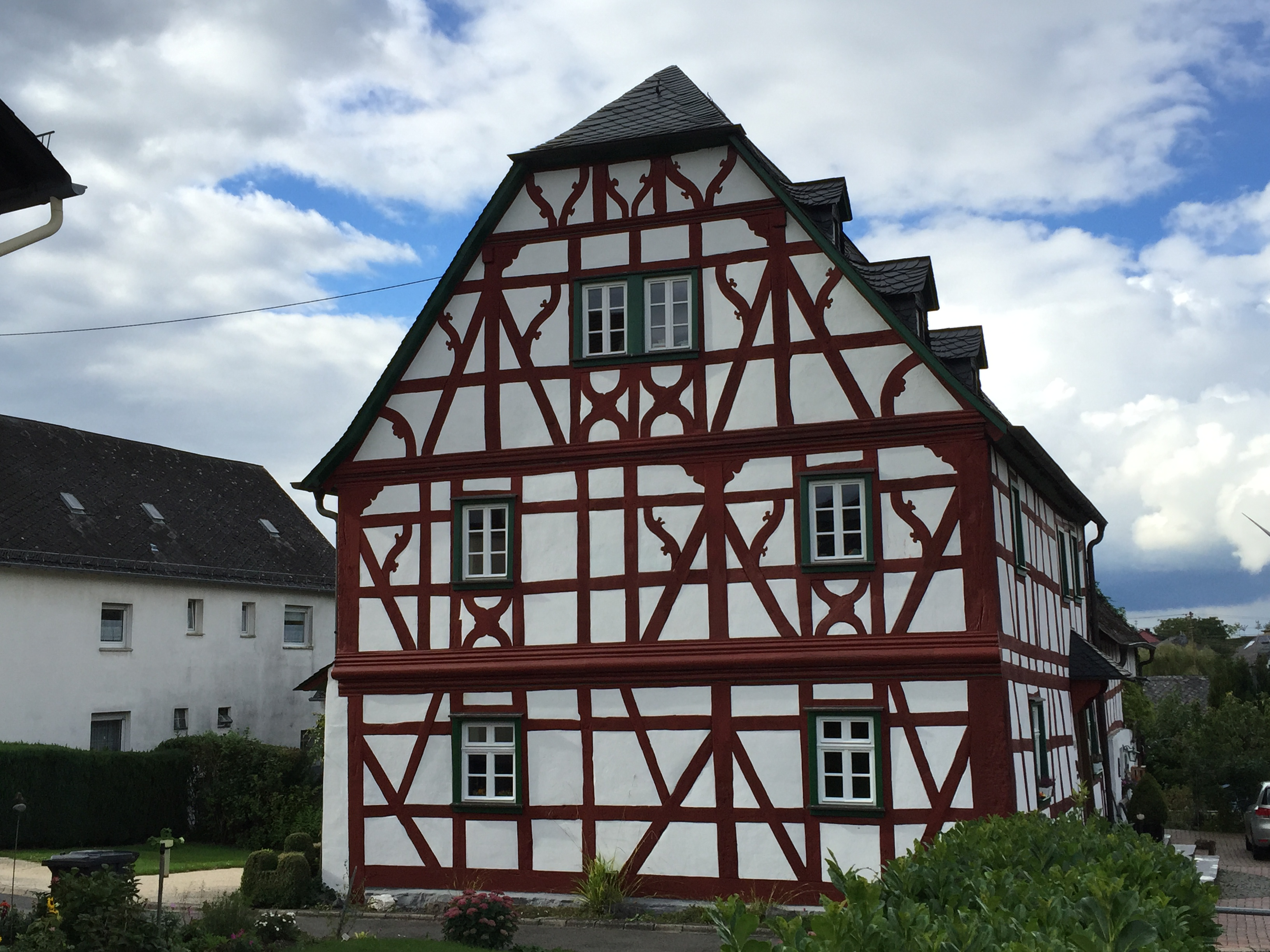 Kratzenburg (Hunsrück), ehemaliges Pfarrhaus; Streckhof; Fachwerkbau, zweite Hälfte des 17. Jahrhunderts, Hofseite und Fachwerk-Stall 18. Jahrhundert